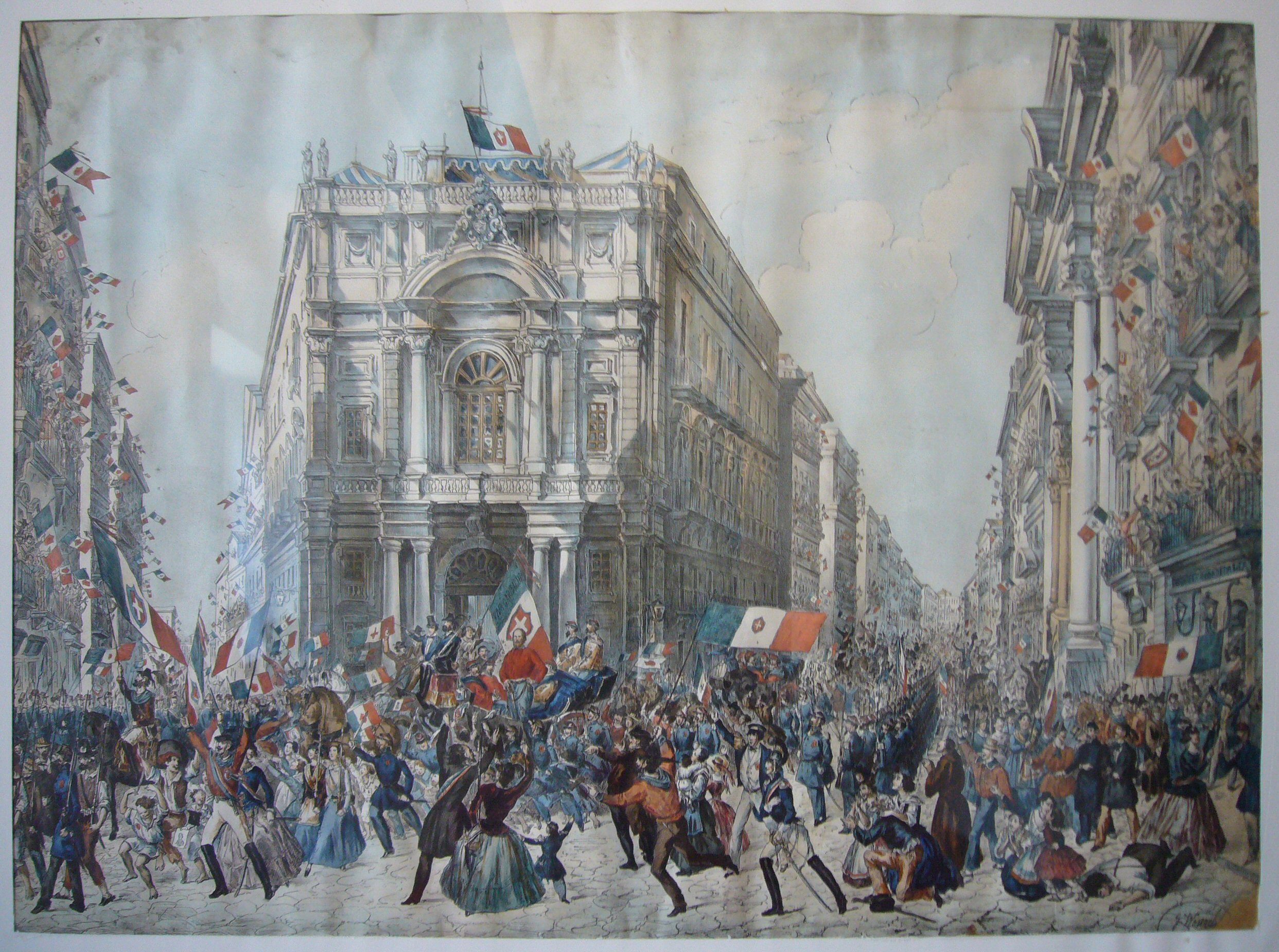 ingresso d i Garibaldi a Napoli il 7 settembre 1860 (Napoli, Museo civico di Castel Nuovo)